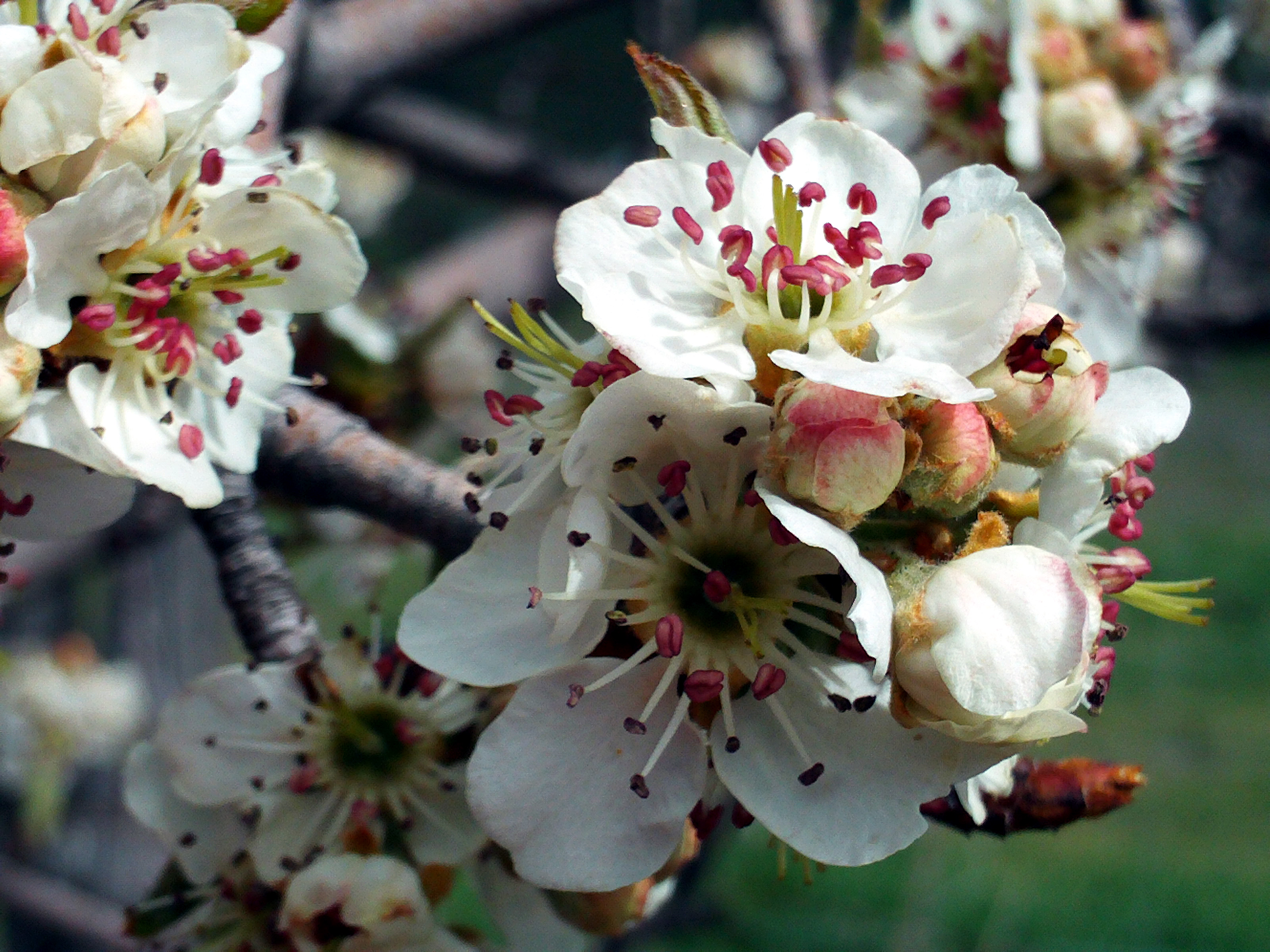 Pyrus_bourgaeana en Dehesa Boyal de Puertollano, Puertollano, Spain.